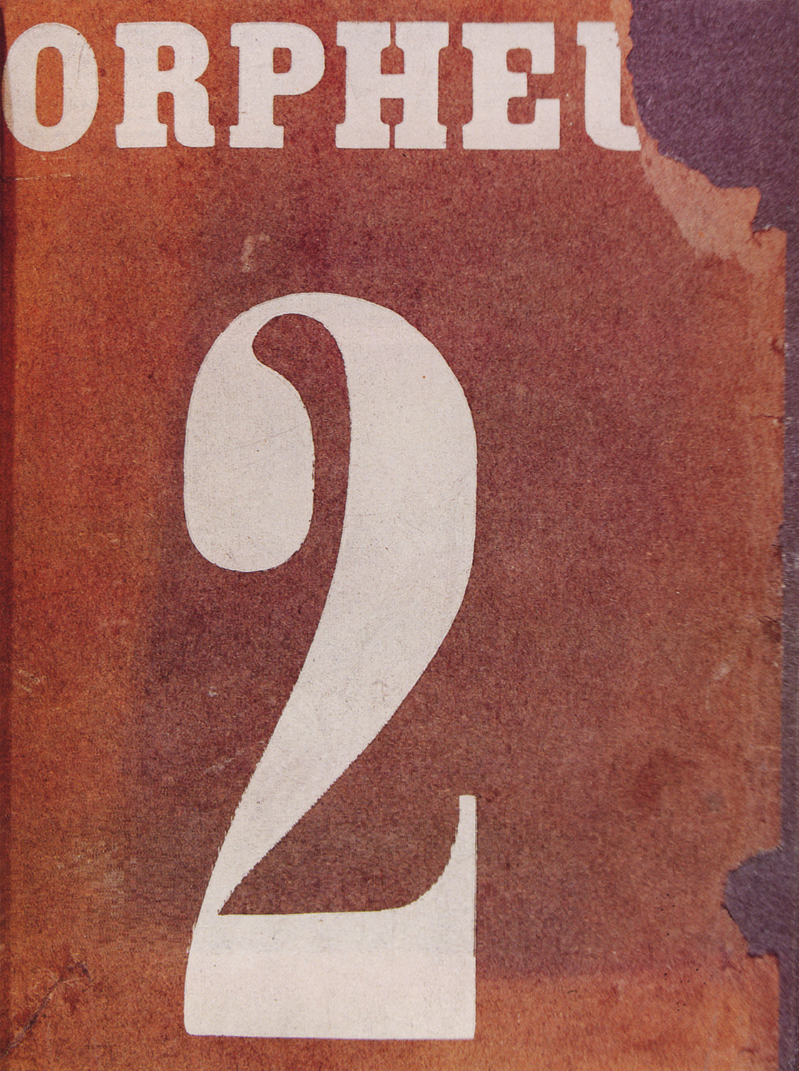 Capa do nº2 da revista Orpheu